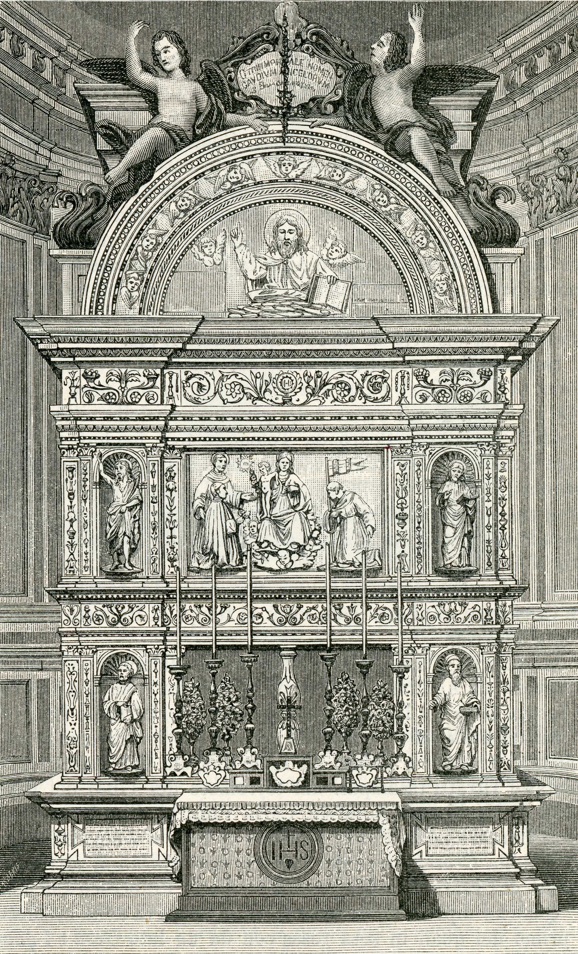 Aquila (chiesa di San Bernardino): mausoleo di San Bernardino da Siena (xilografia di Barberis 1898).